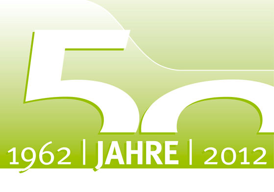 Jubiläum 50 Jahre Evangelisches Krankenhaus Wesel (1962 bis 2012) Freie Nutzung, wenn der Urheber genannt wird